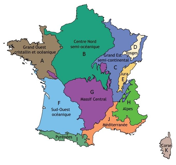 Division de l'IGN